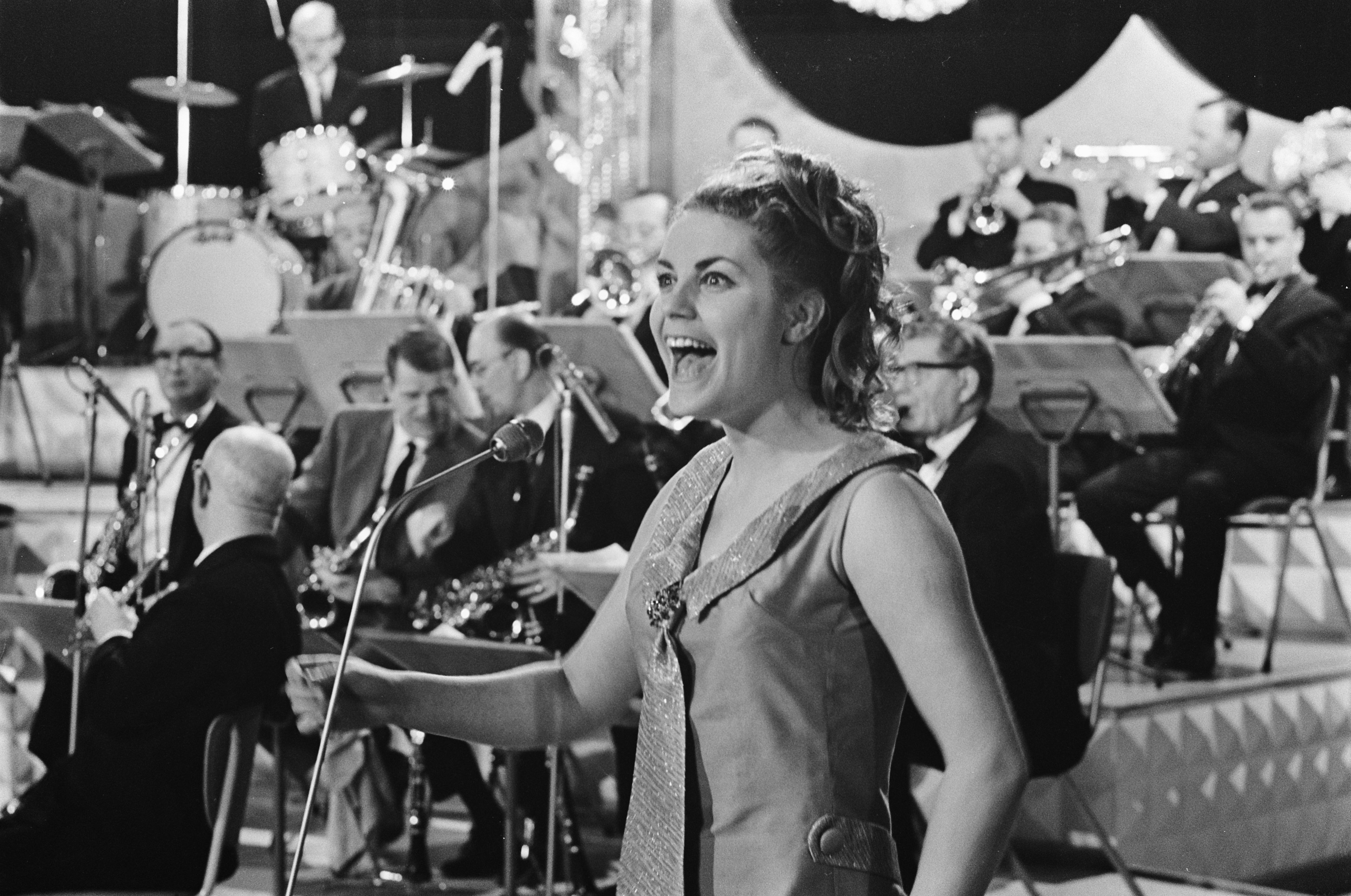 Collectie / Archief : Fotocollectie Anefo Reportage / Serie : [ onbekend ] Beschrijving : Finale Nederlands Songfestival in Tivoli te Utrecht. Conny Vink tijdens repetitie Datum : 28 februari 1968 Locatie : Utrecht Trefwoorden : SONGFESTIVALS, finales, repetities Instellingsnaam : Tivoli Fotograaf : Koch, Eric / Anefo Auteursrechthebbende : Nationaal Archief Materiaalsoort : Negatief (zwart/wit) Nummer archiefinventaris : bekijk toegang 2.24.01.05 Bestanddeelnummer : 921-1226